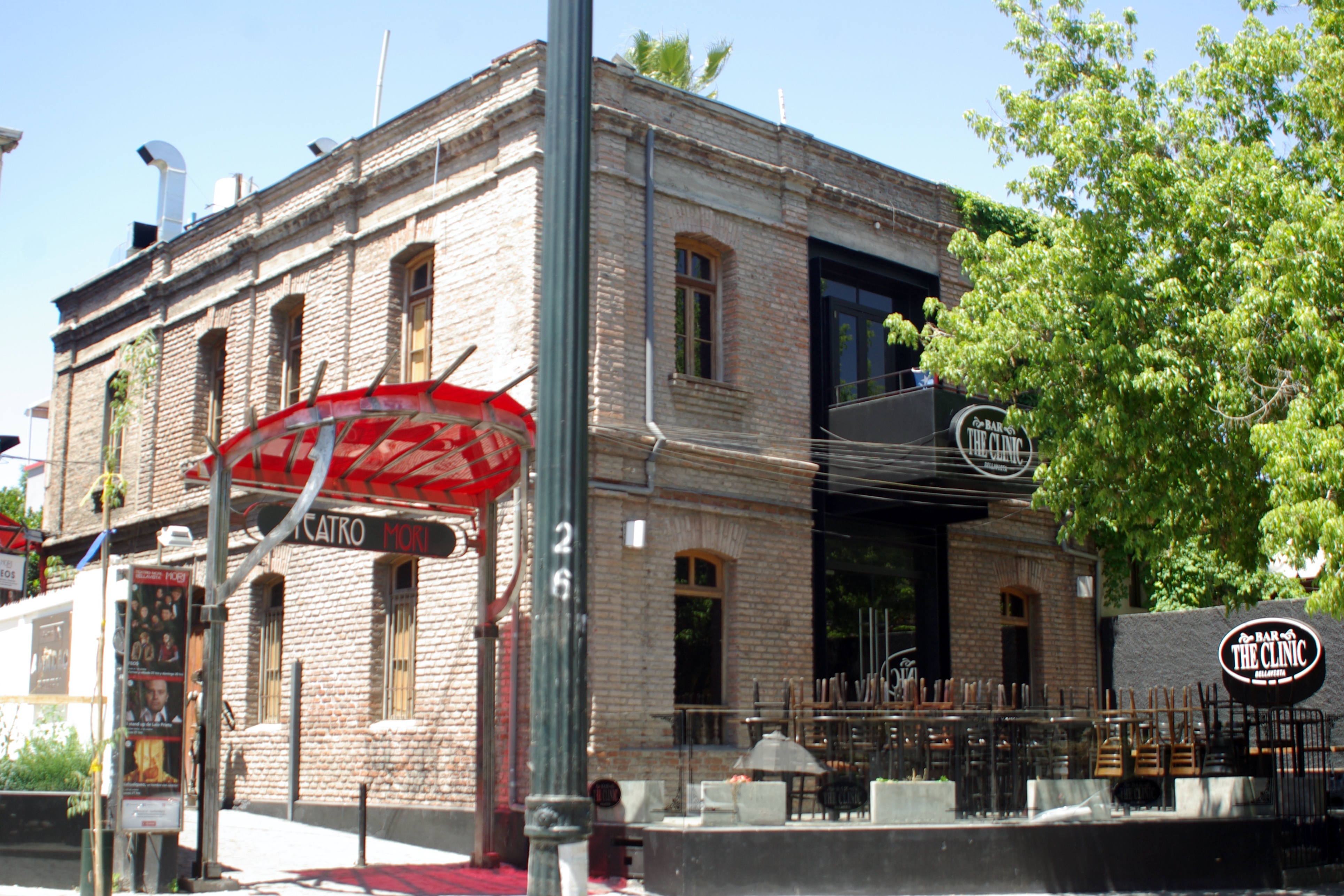 Teatro Mori, junto a la plaza Camilo Mori en la calle Constitución, barrio Bellavista, Santiago de Chile. Al lado, el bar The Clinic.